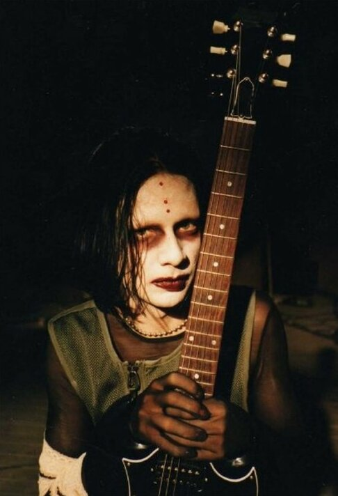 zz.mm. con su guitarra